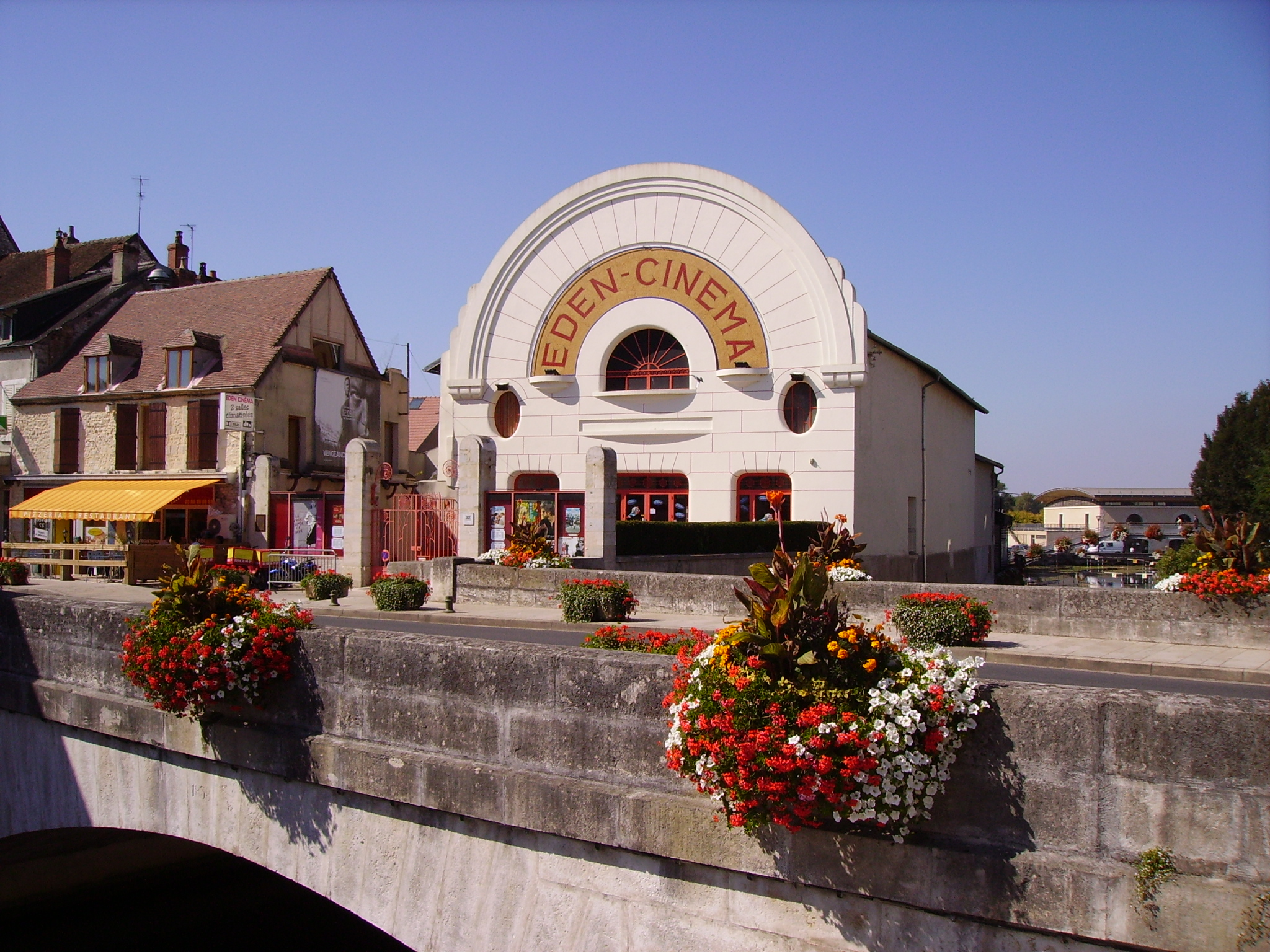 Le Cinéma Éden est classé aux Monuments historiques. Il est parrainé par Catherine Deneuve et Bruno Putzulu. Le célèbre photographe Raymond Depardon a pris en 2009 une photo de cette façade Art déco (visible dans le livre La France de Raymond Depardon, coll. Beaux livres, BNF/Seuil, Paris, 2010, et dans le magazine Photo n° 473 d'octobre 2010, p. 37). Lieu : Cosne-Cours-sur-Loire, Nièvre, France.